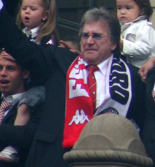 Uitsnede van foto waarop Lee Towers te zien is bij de bekerhuldiging van Feyenoord bij het stadhuis aan de Coolsingel in Rotterdam.